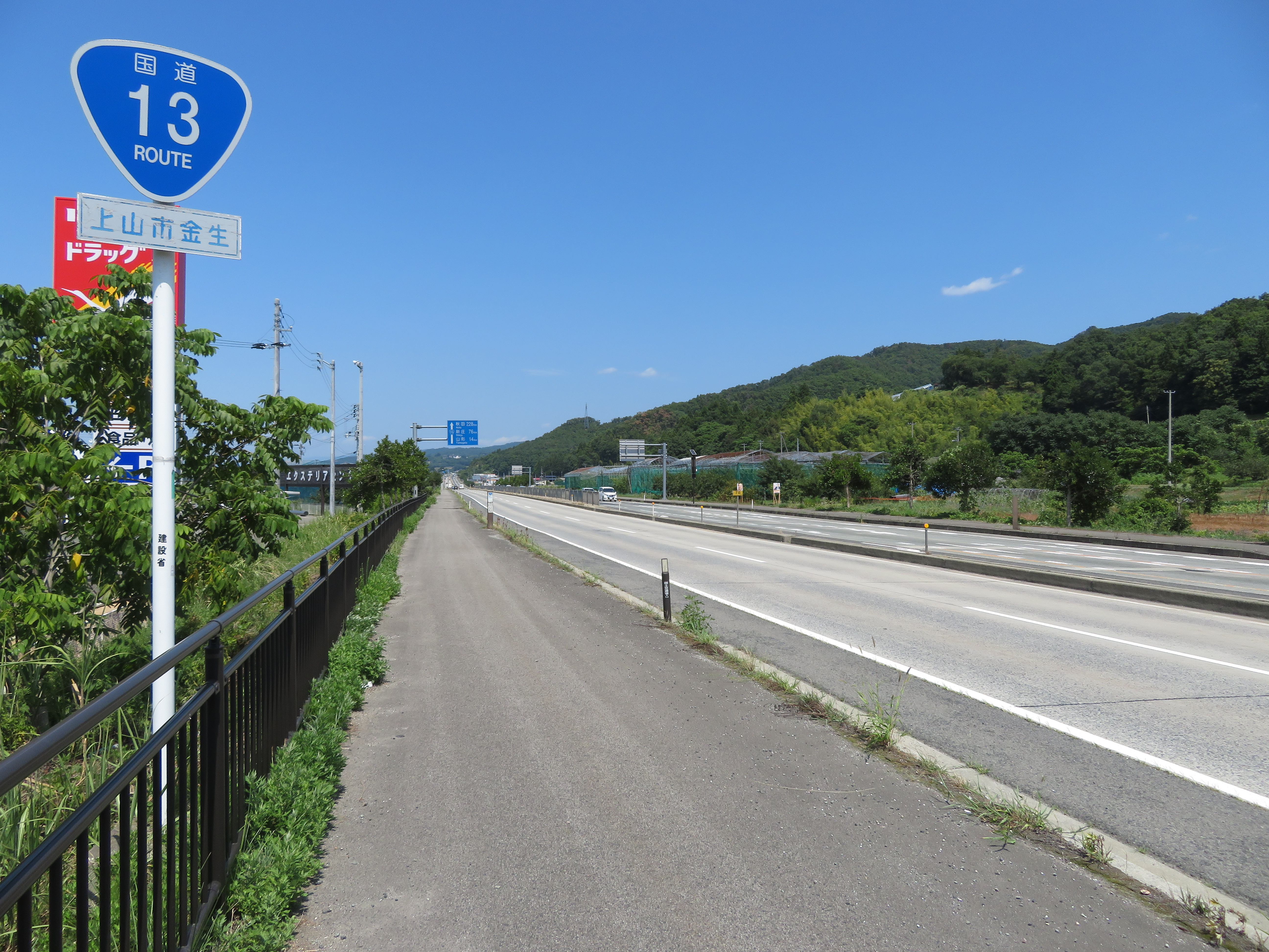 国道13号線上山バイパス山形県上山市金生付近（山形市方面を撮影） Canon PowerShot SX720 HS